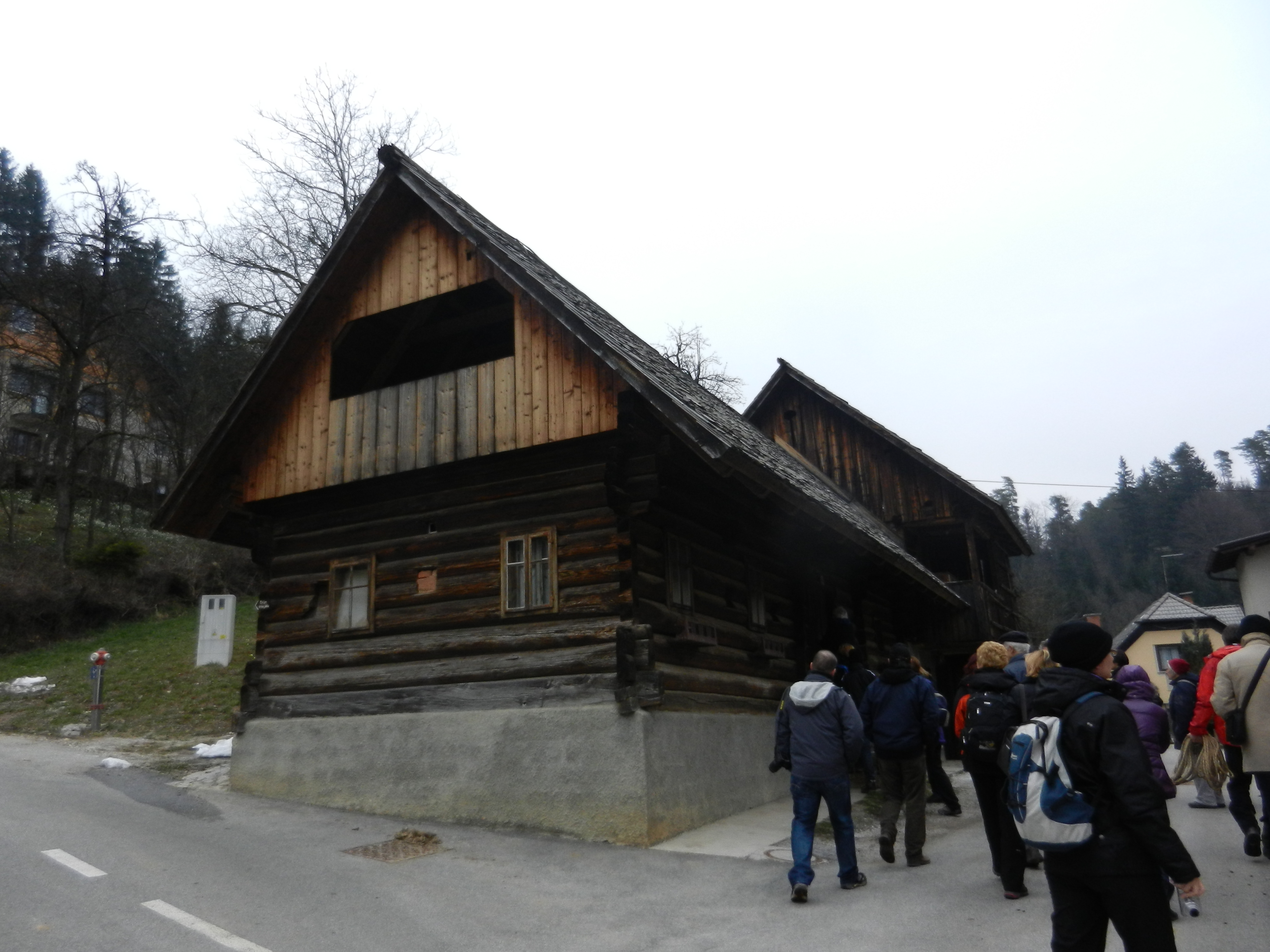 Vogvarjeva hiša v Dupljah